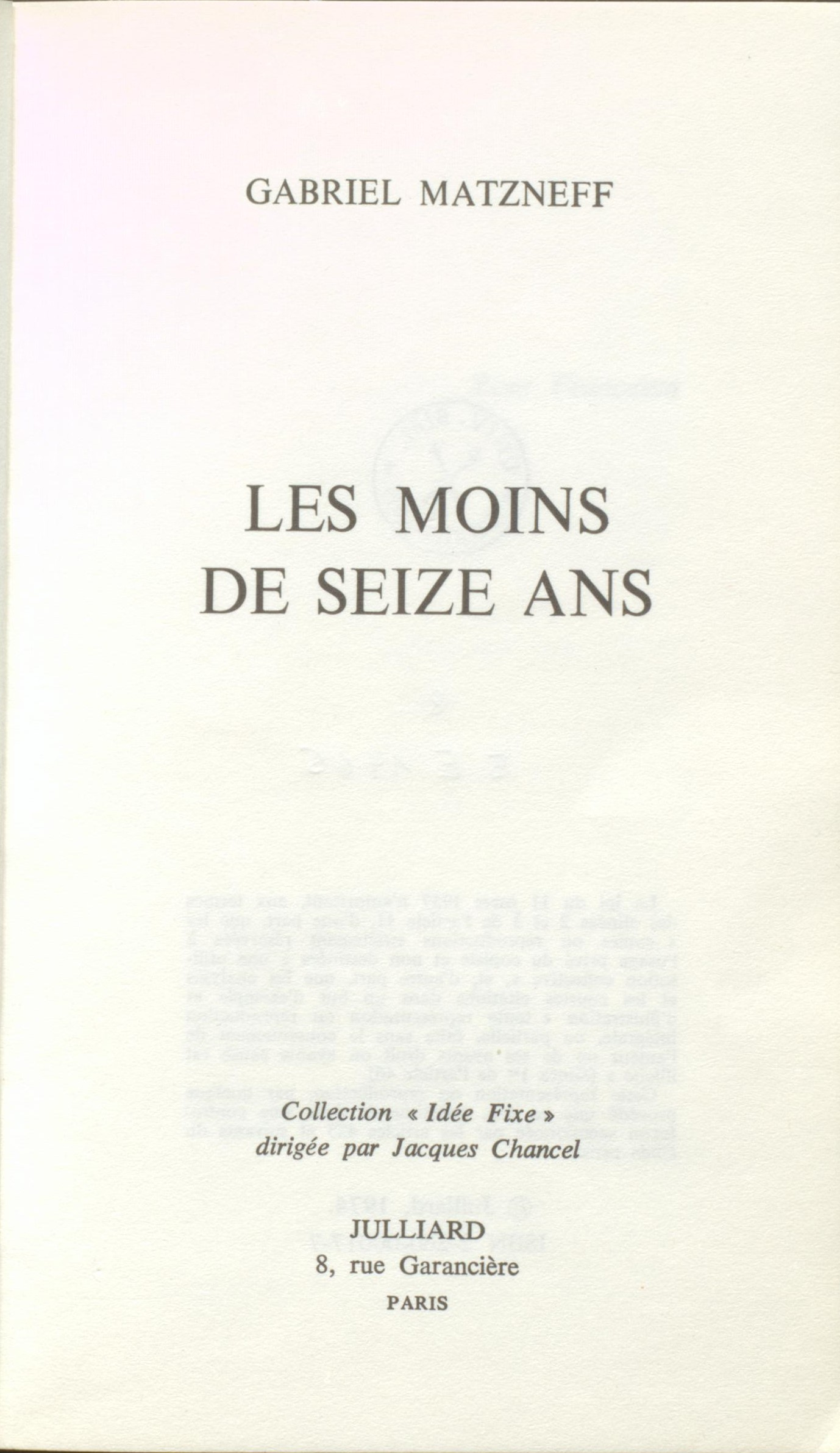 Gabriel Matzneff Les moins de seize ans 1976 titre